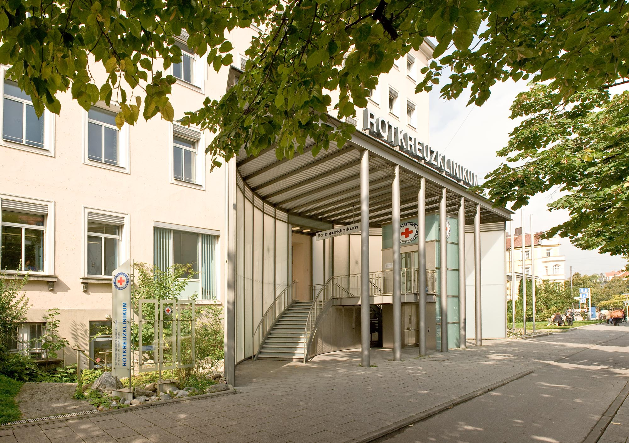 Die Rotkreuzklinik München